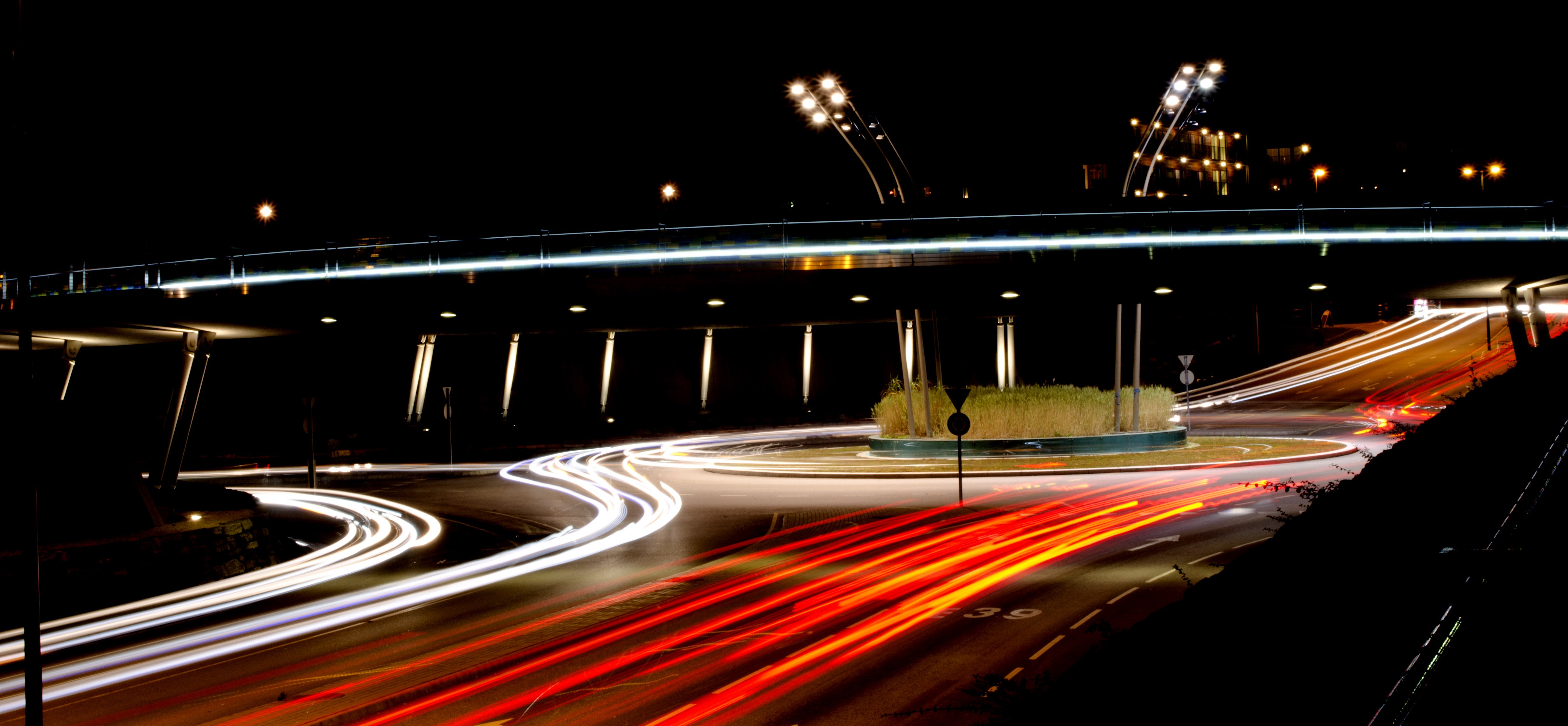 Tjensvollkrysset in Stavanger, Norway